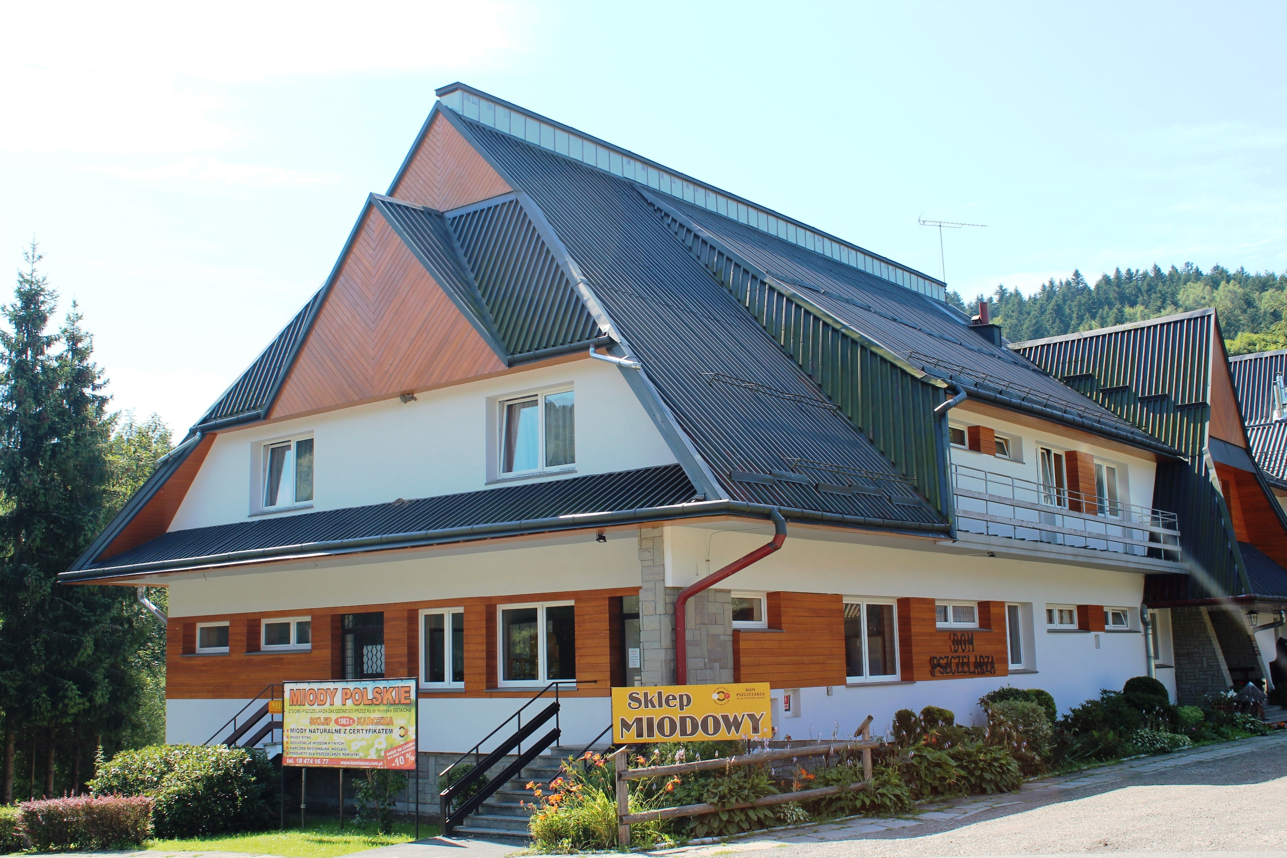 Kamianna